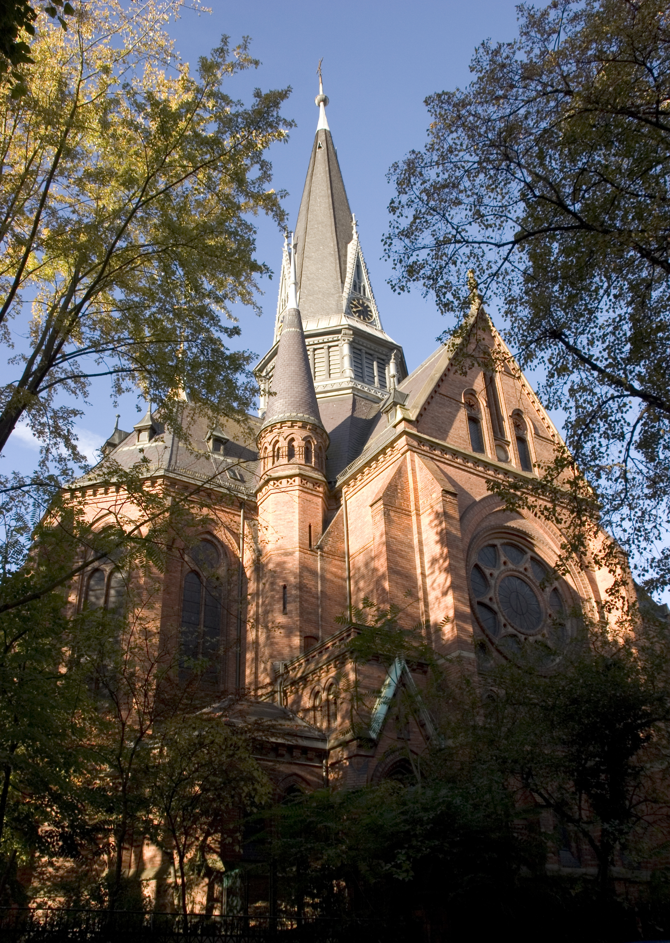 Bergkirche Wiesbaden Photographer : Rainer Rosenbaum (Wiesbaden) Copyright by Rainer Rosenbaum